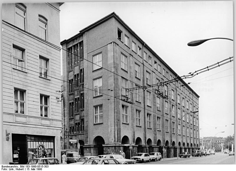 Berlin, Rosenthaler Straße, Dewag-Gebäude ADN-Link15.5.90 - Hof. - Berlin: Dewag-Gebäude in der Rosenthaler Straße 28-31 - Ecke Sophienstraße am Hackeschen Markt.